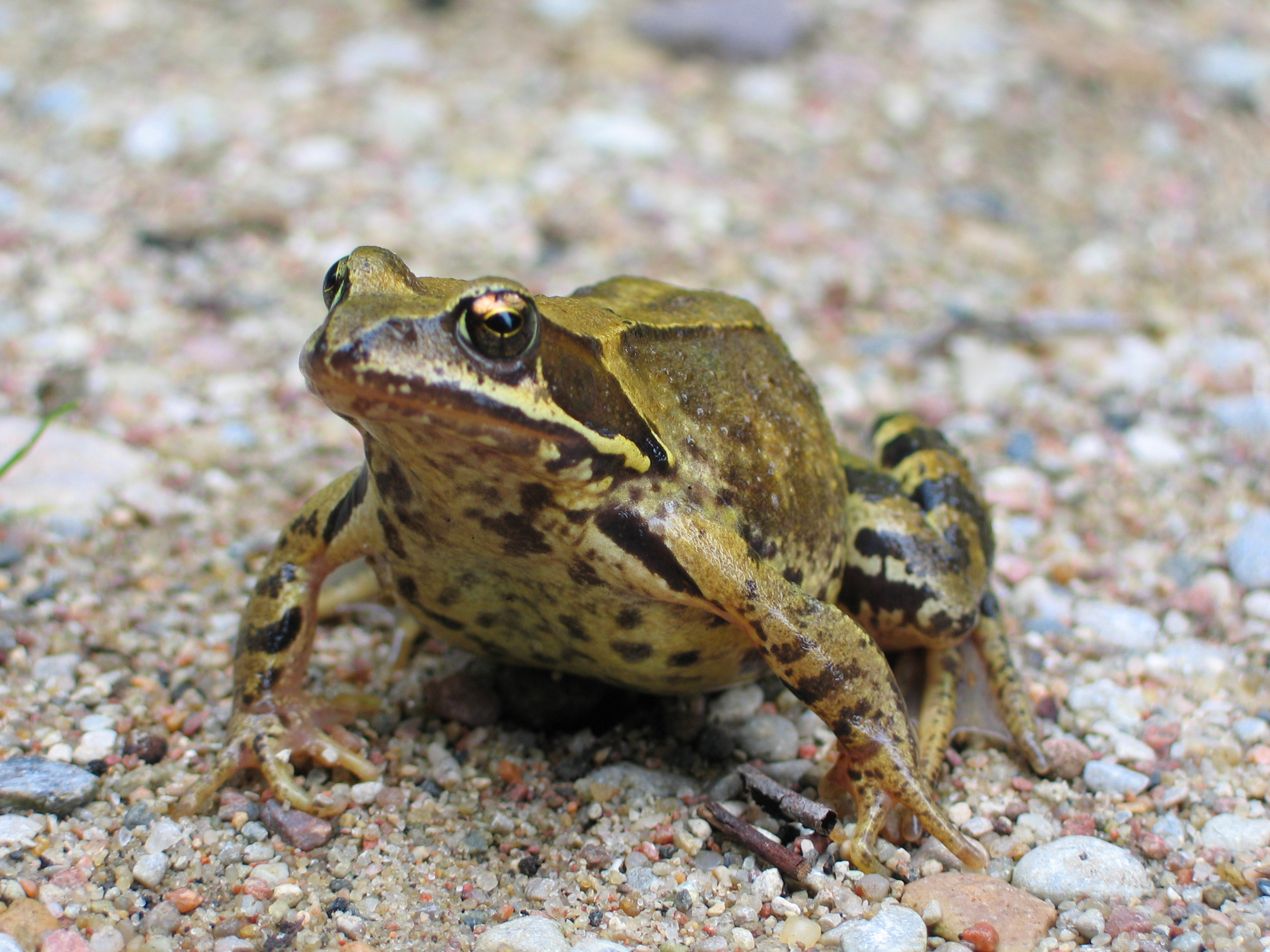 Rana temporaria (pl: Żaba trawna)